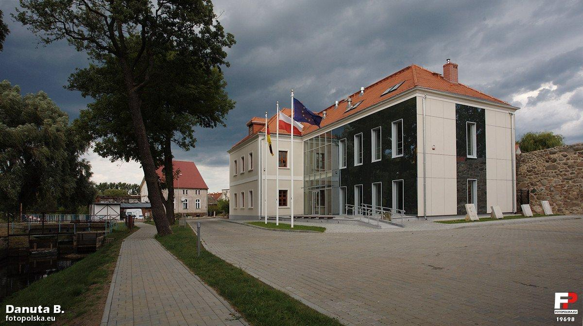 Ja wyczytałam w internecie w 2004-06 r. do grożącego zawaleniem budynku (część od frontu) dobudowano skrzydło, teren zagospodarowano. Budynek przeznaczony na potrzeby centrum współpracy polsko-niemieckiej. Flagi wskazują inwestorów.